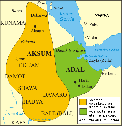 Adal sultanerriko mapa k.o. 1500 inguru